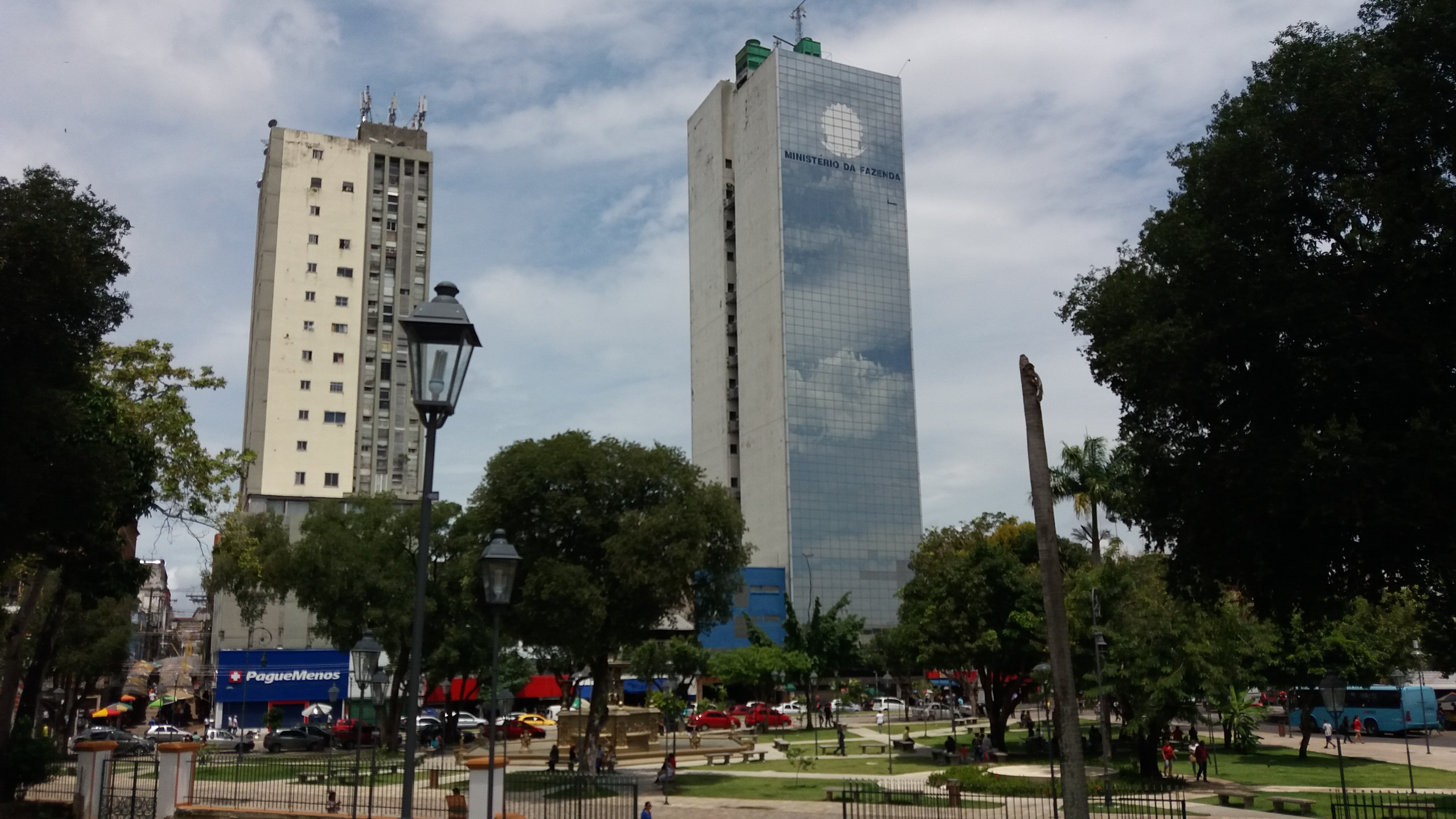 Está localizada no Centro da cidade de Manaus, Amazonas, Brasil.